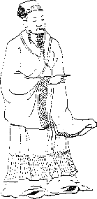 Tĩnh Đô Vương Trịnh Sâm